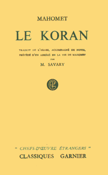 cover of "Le Koran, traduction, précédée d'un abrégé de la vie de Mahomet et accompagnée de notes" a été publié par Savary en 1751.